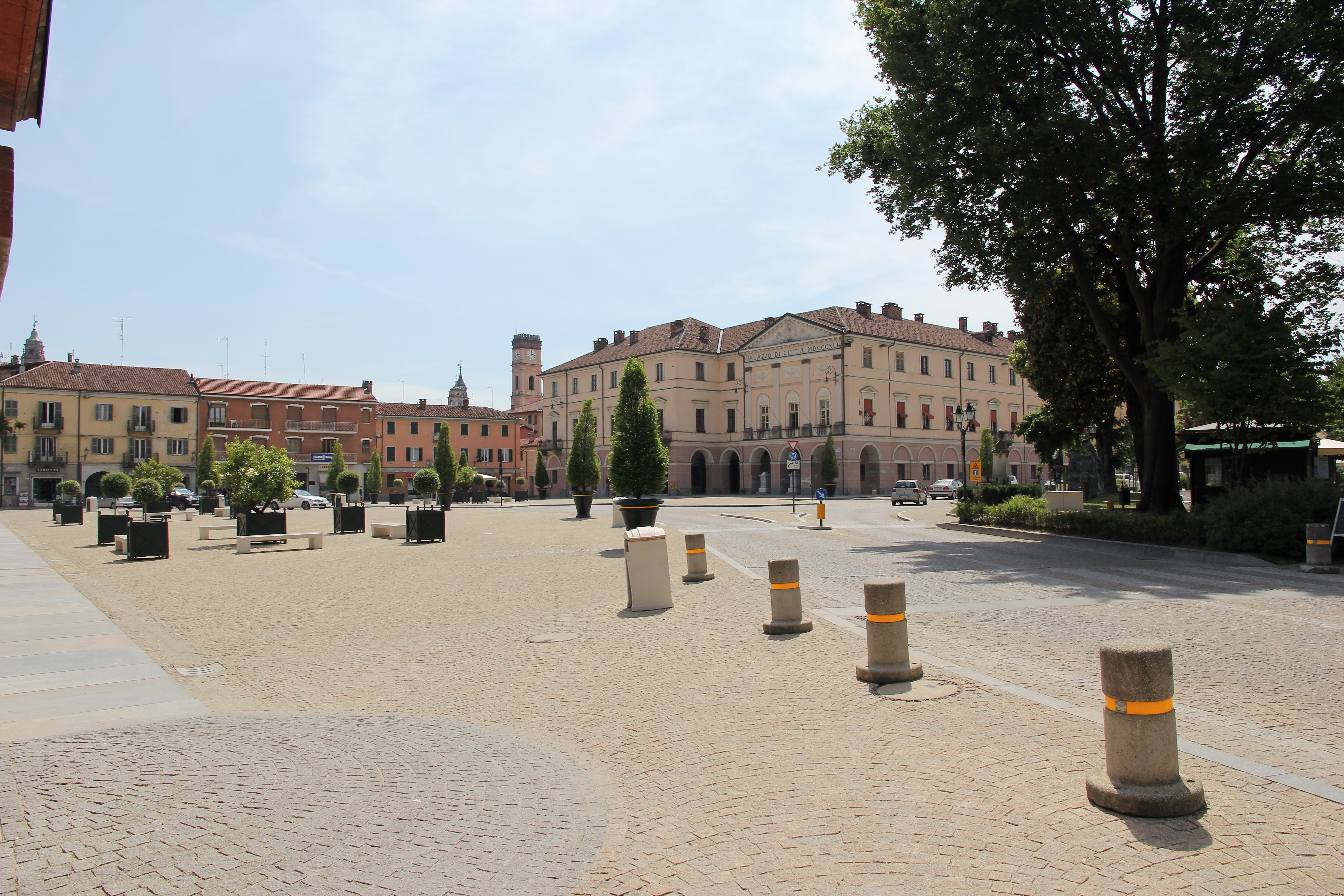 Racconigi, piazza Carlo Alberto